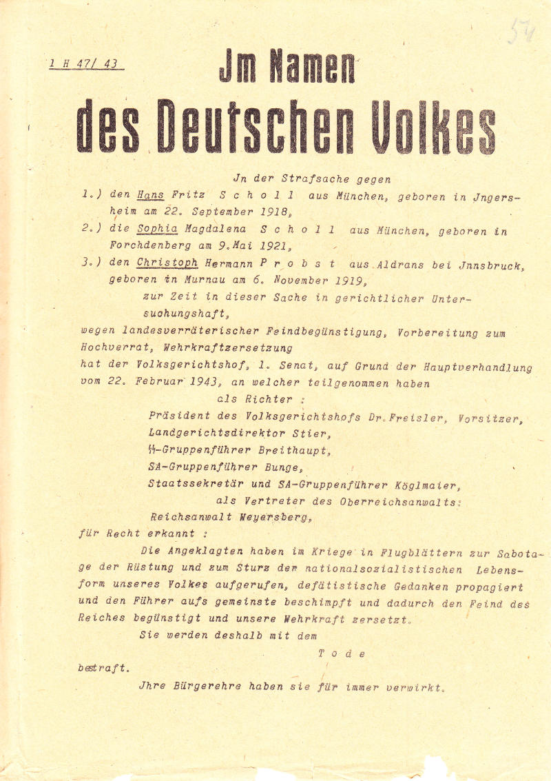 Auszug aus dem Urteil des Volksgerichtshofes in der Strafsache gegen Hans Scholl, Sophie Scholl und Christoph Probst vom 22. Februar 1943 (erstes Blatt)